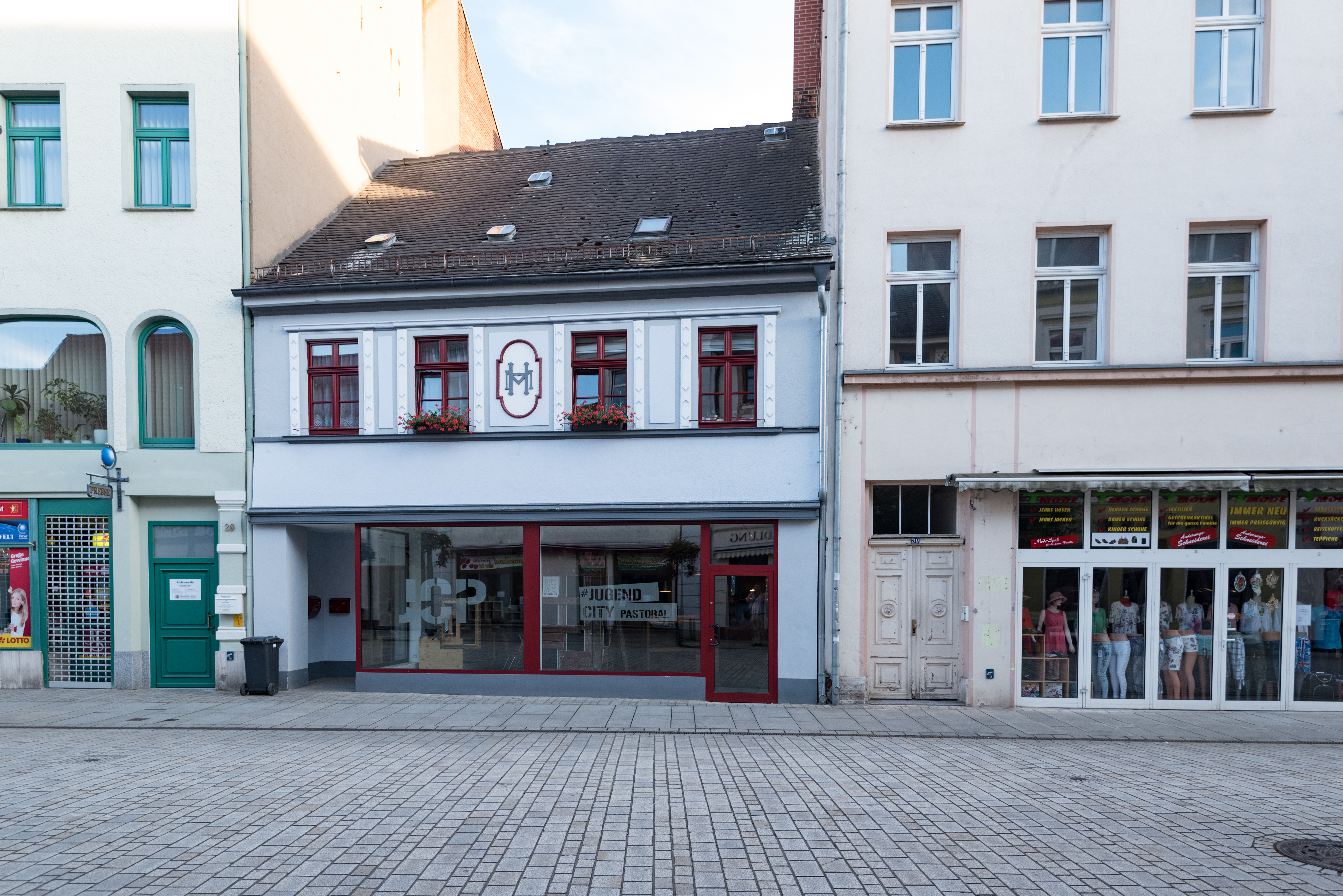 Weißenfels, Jüdenstraße 28